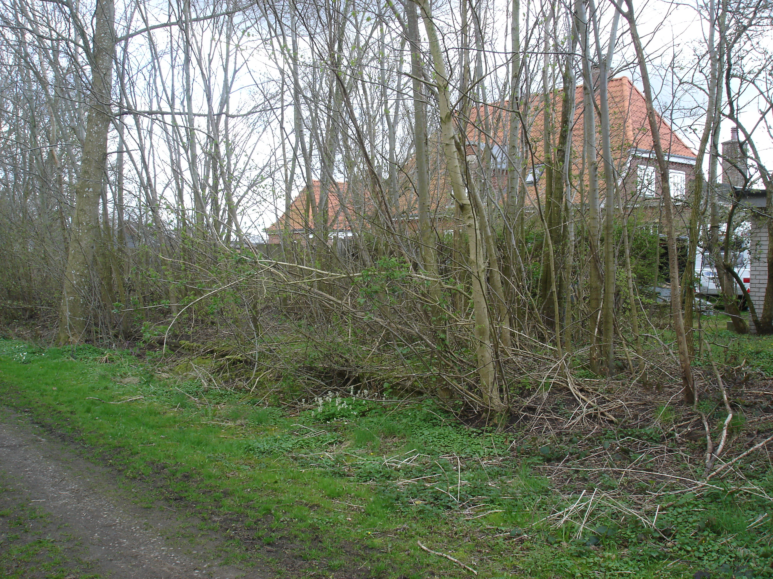 Gesten Stations øperron længst væk fra stationsbygningen - her holdt Kolding-togene